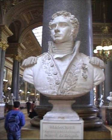 buste de Joseph Sécret Pascal-Vallongue dans la galerie des batailles du château de Versailles